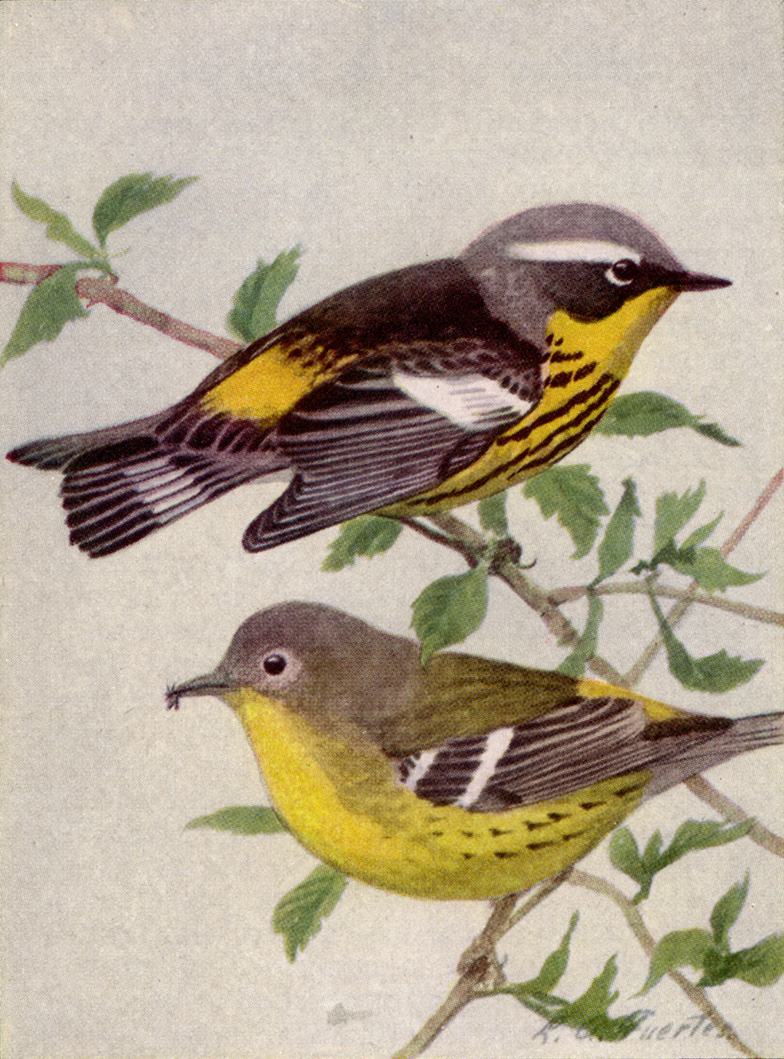 MAGNOLIA WARBLER. Adult and Immature Male.